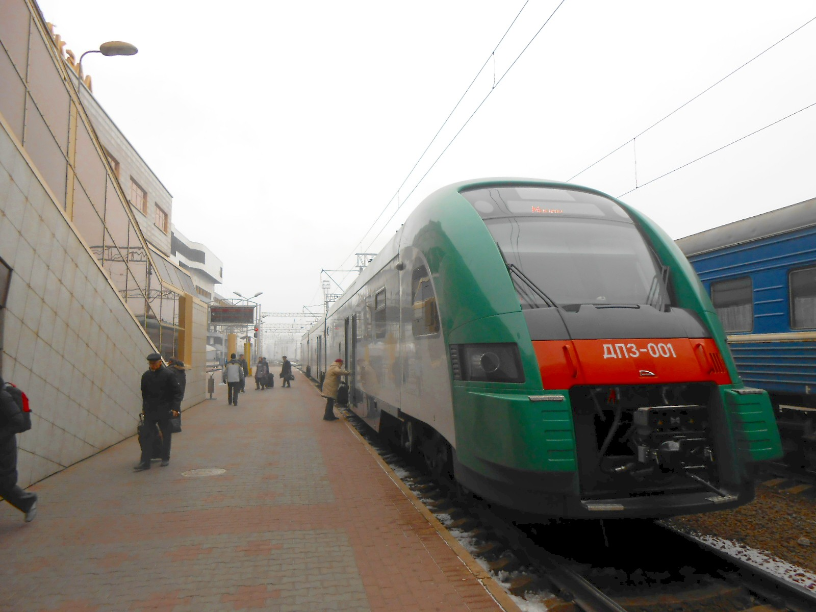 Дизель-поезд ДП3-001 (PESA 730M) на станции Минск Пассажирский